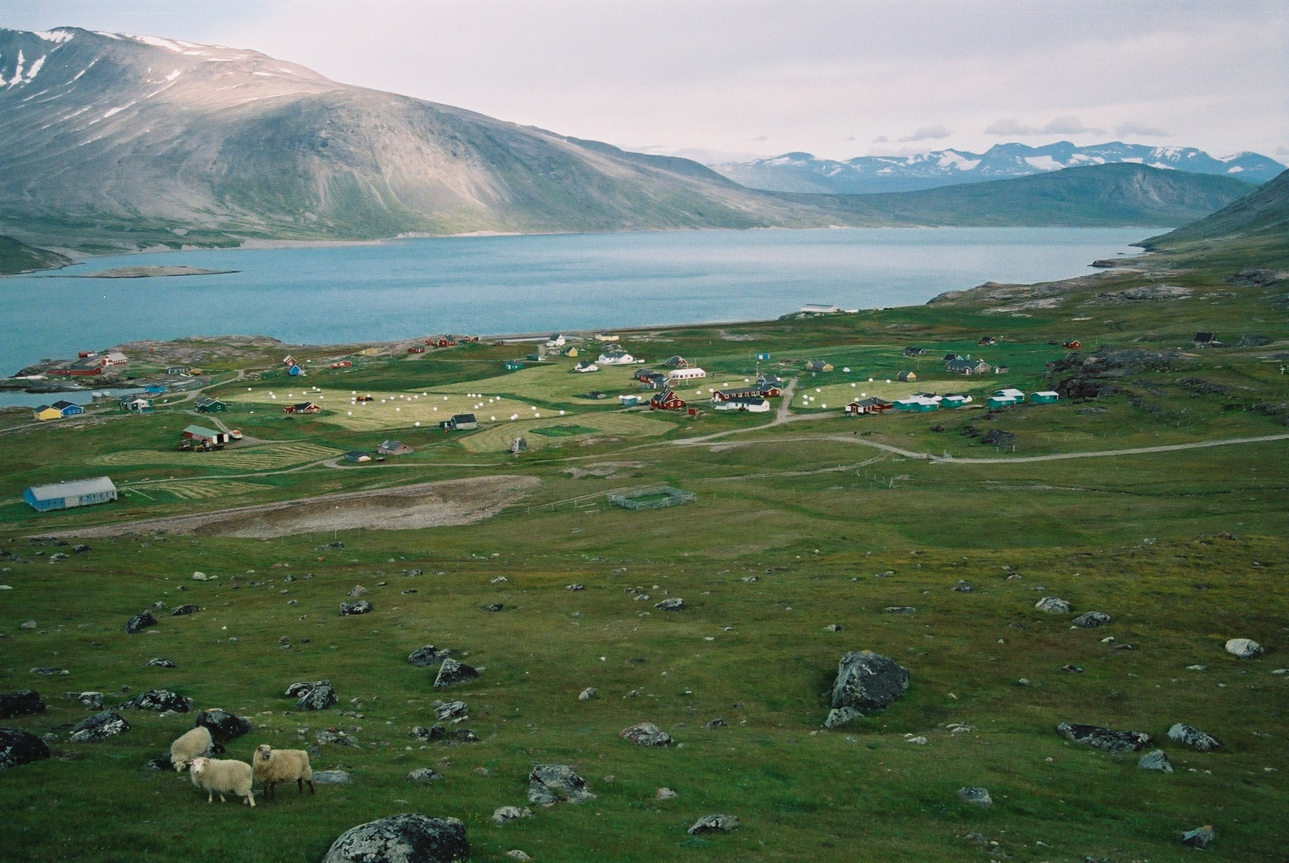 igaliku